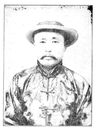 中華民國國會議員